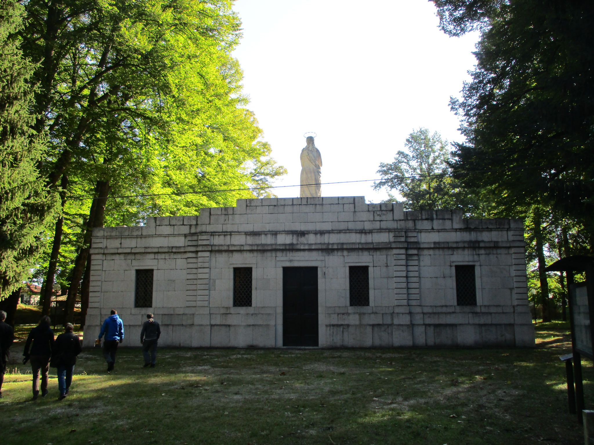 Parco dell'Incile